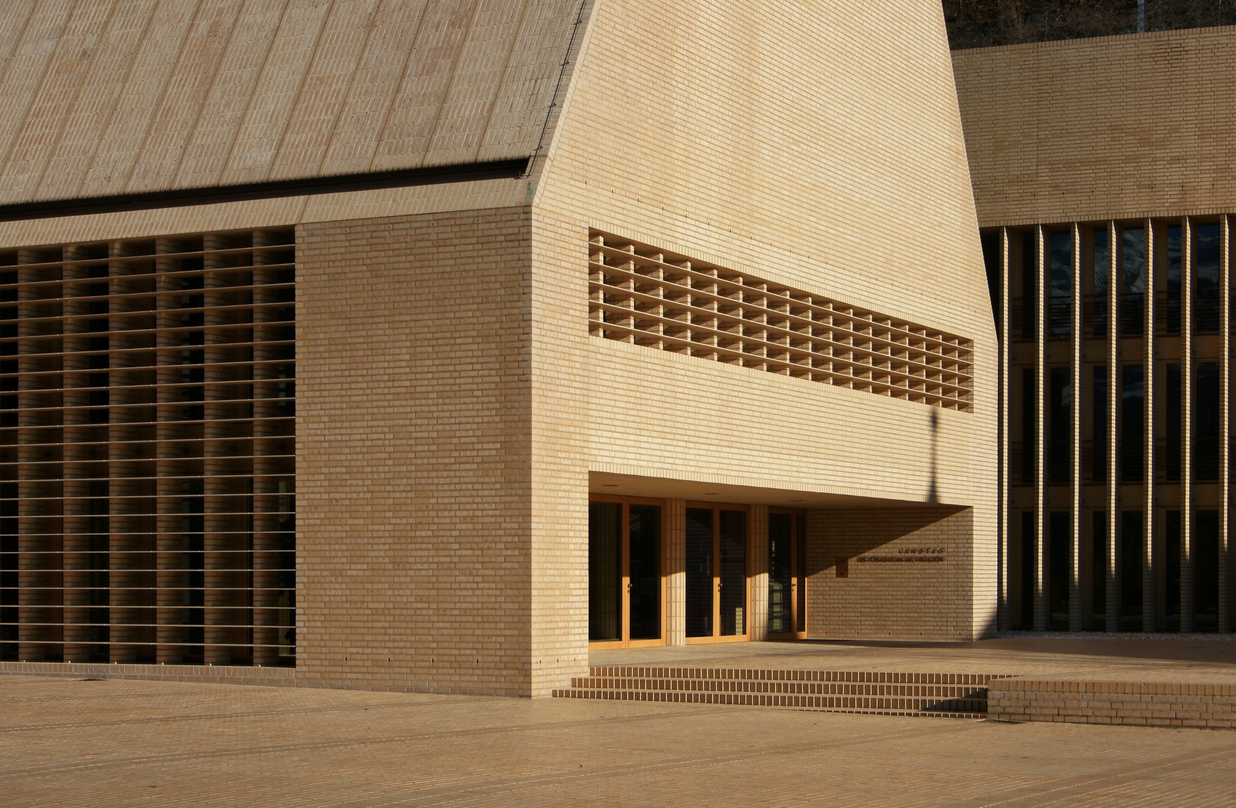 Details: Hohes Haus und Langes Haus des Liechtensteinischen Landtags in Vaduz erbaut 2007. Architekt Hansjörg Göritz.